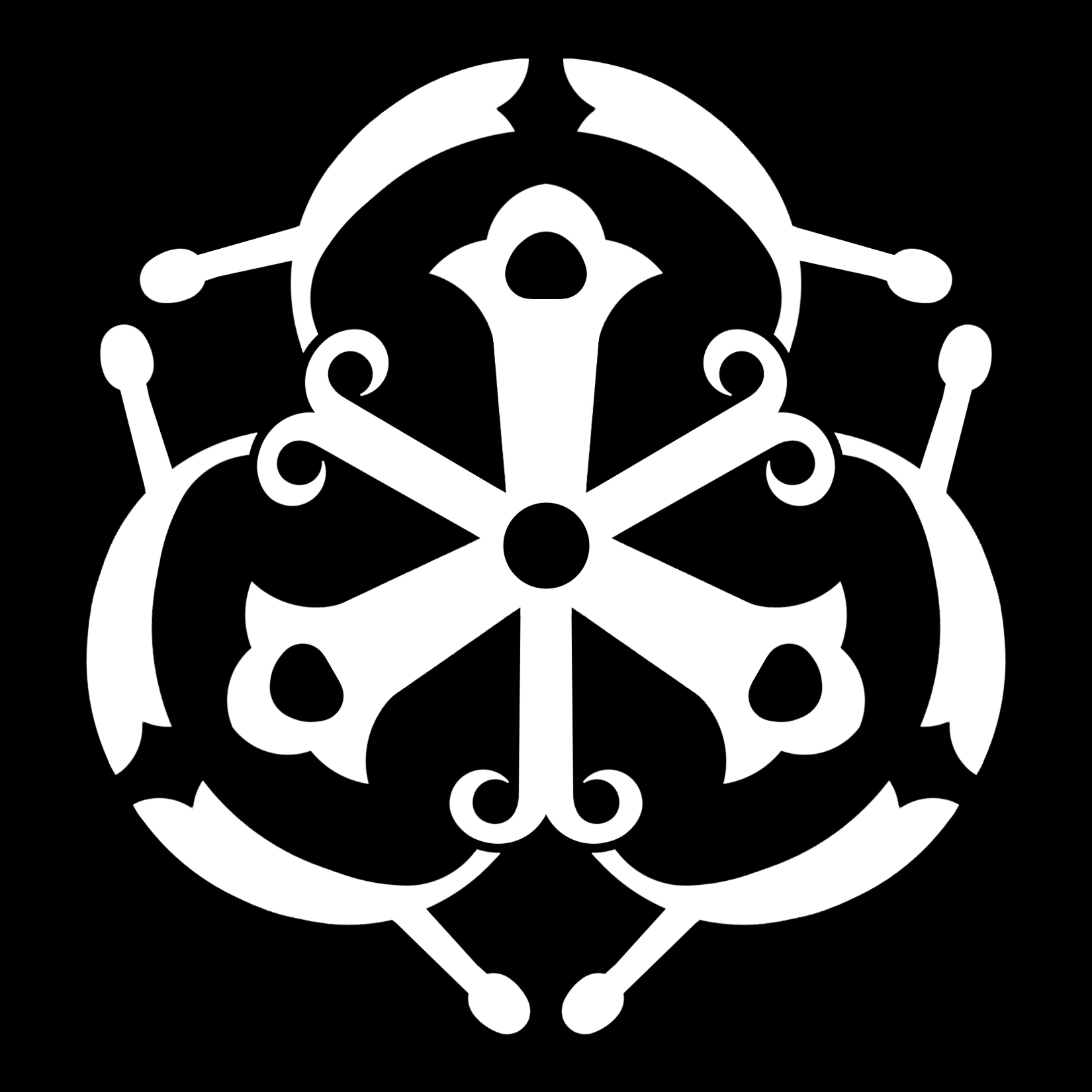 「連翹襷」紋（染抜）